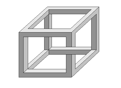 Zelf getekend.